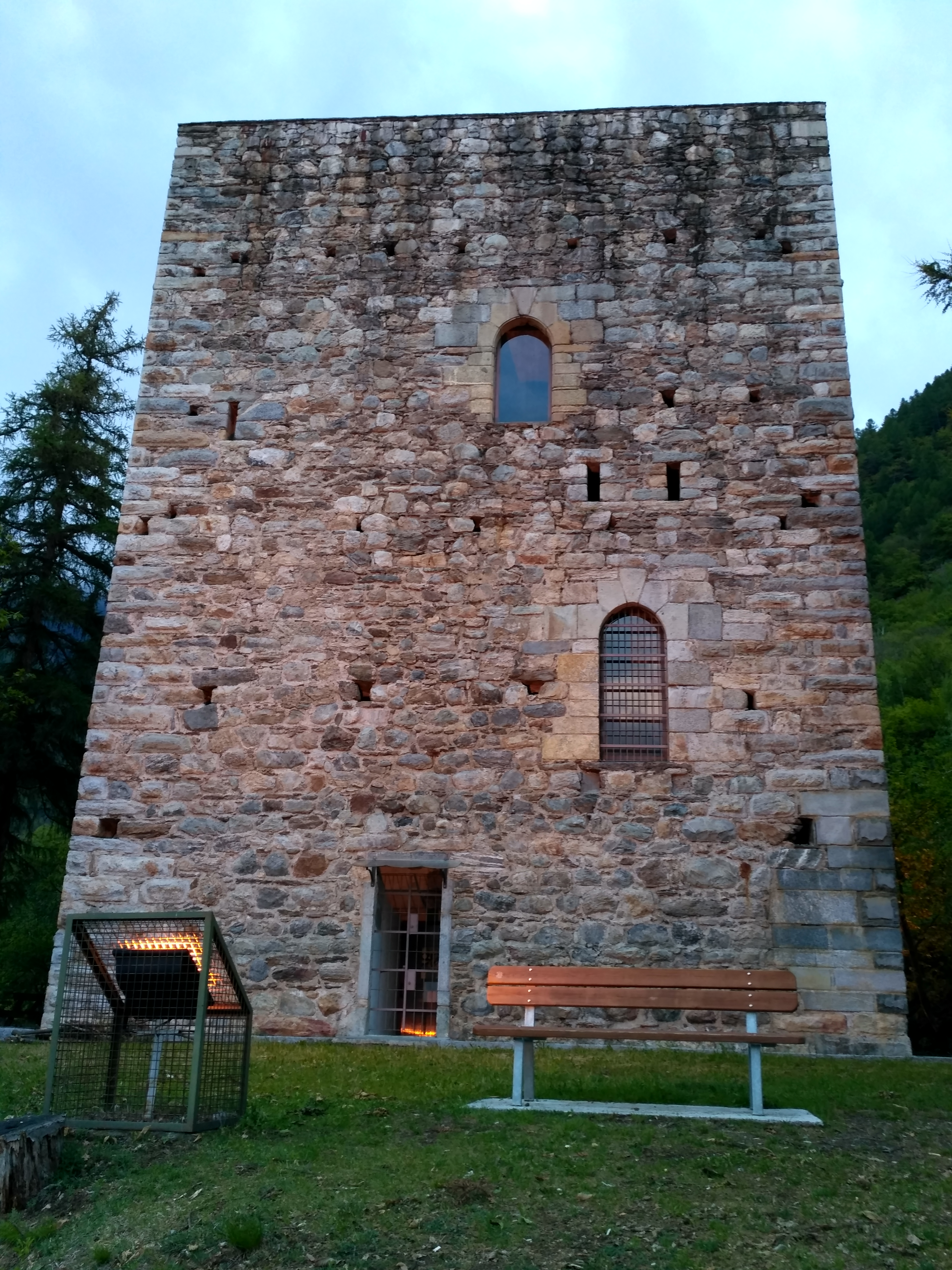 Vista dal lato dell'ingresso della torre di Roncisvalle di Castionetto di Chiuro